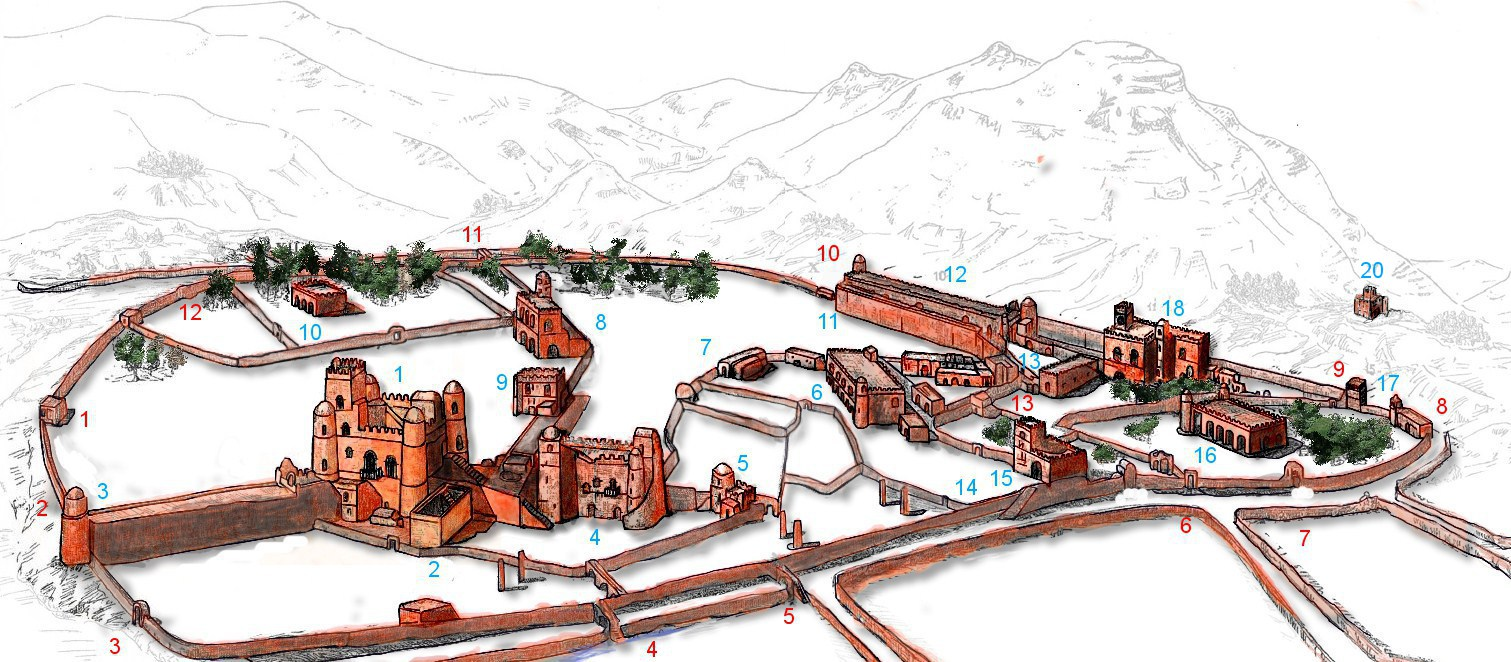 Fasil Gimb